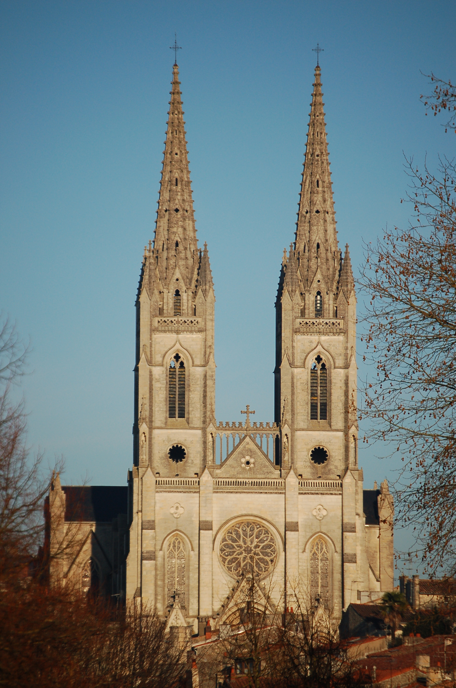 Église St-André, à Niort (France - Deux-Sèvres)